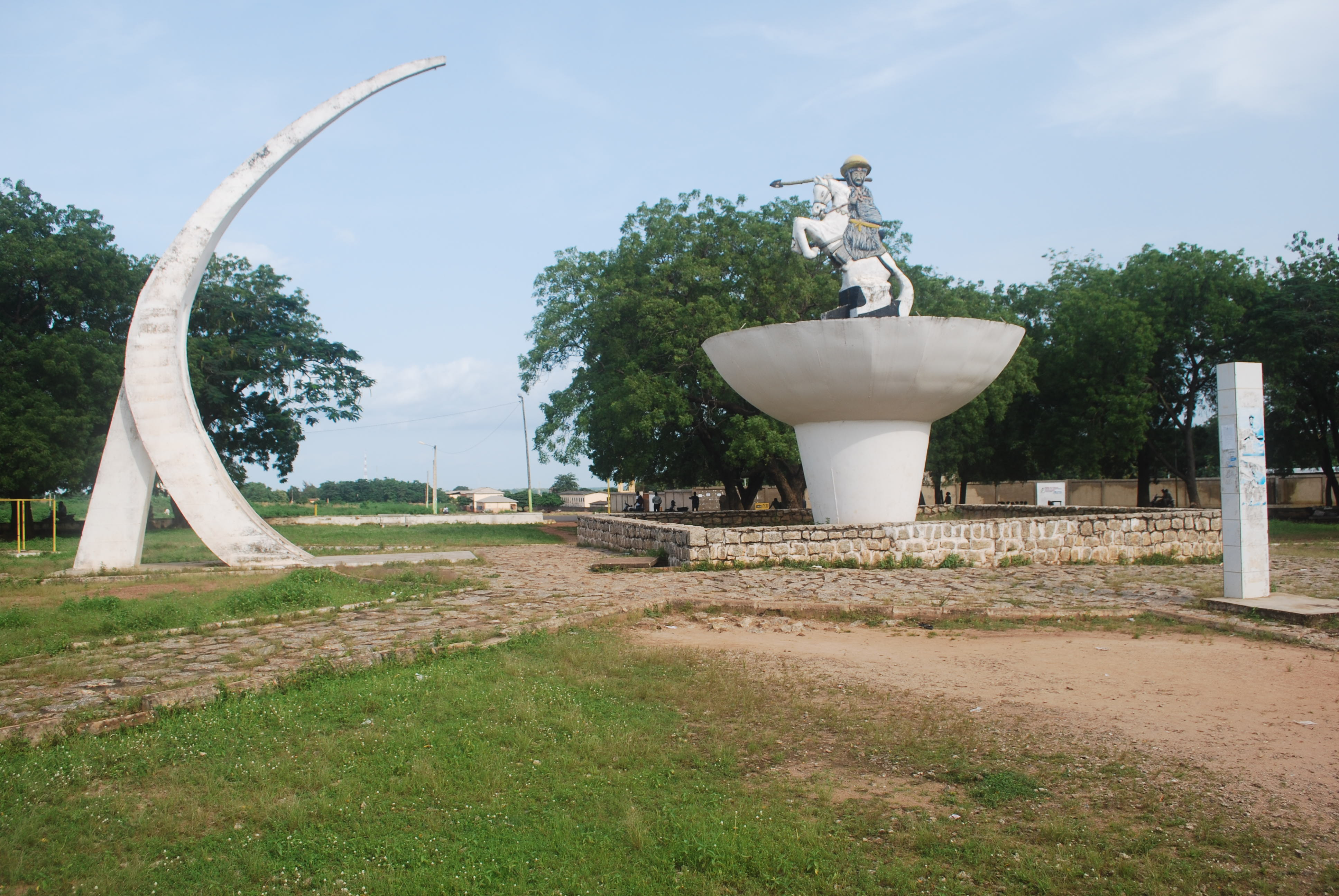 Bio Guéra est un prince guerrier Wassangari, un peuple du Nord. Ce monument représente ce vaillant guerrier qui a mené plusieurs résistances contre la colonisation française au Bénin.